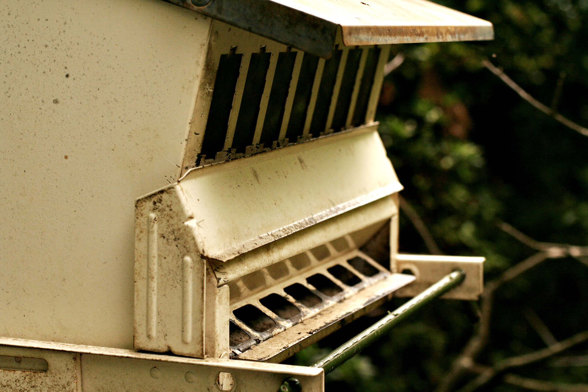 A bird-seed dispenser